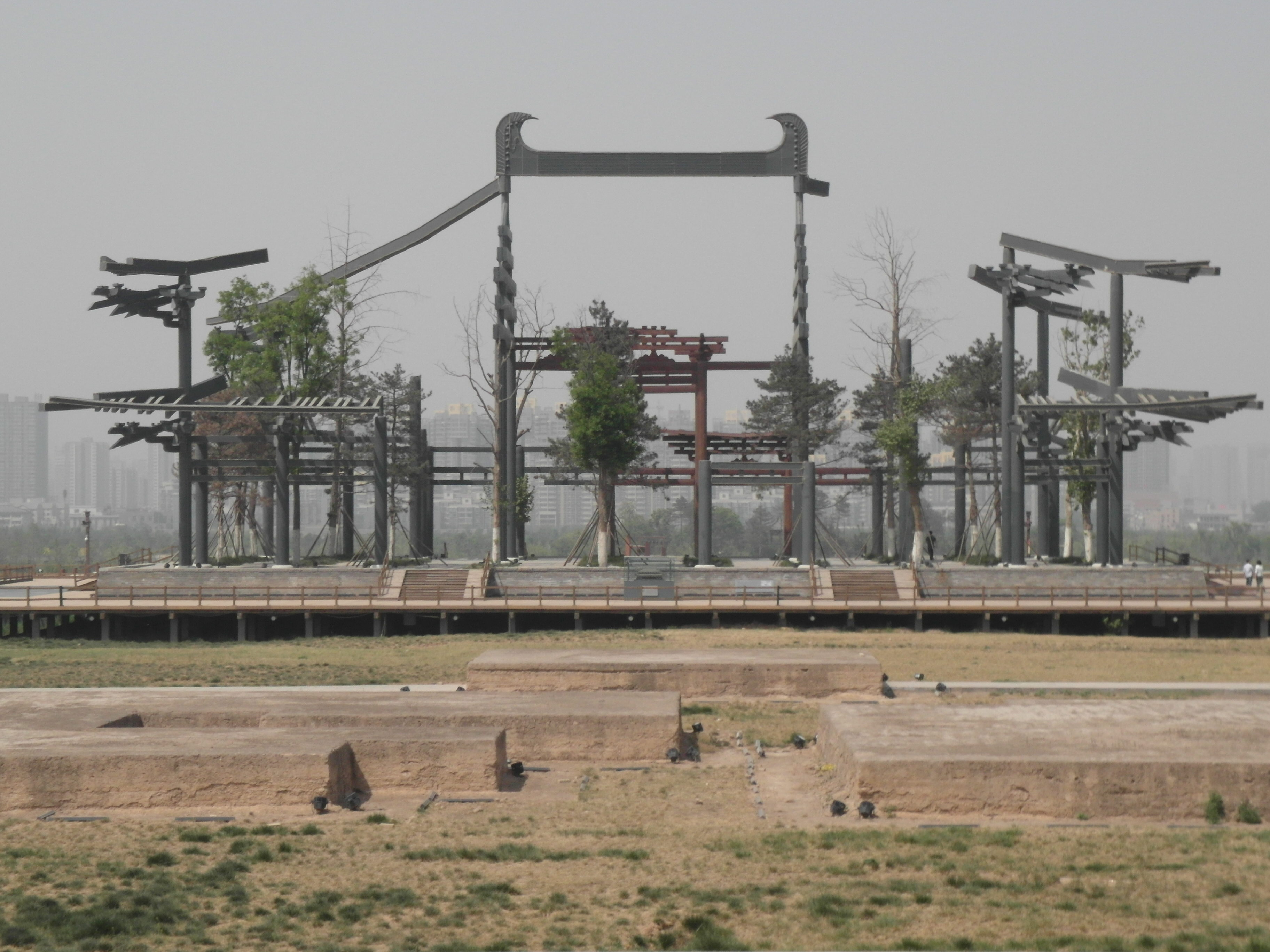 位于陕西省西安市北的大明宫遗址公园内